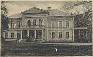 Šalčininkų dvaras I pasaulinio karo metais